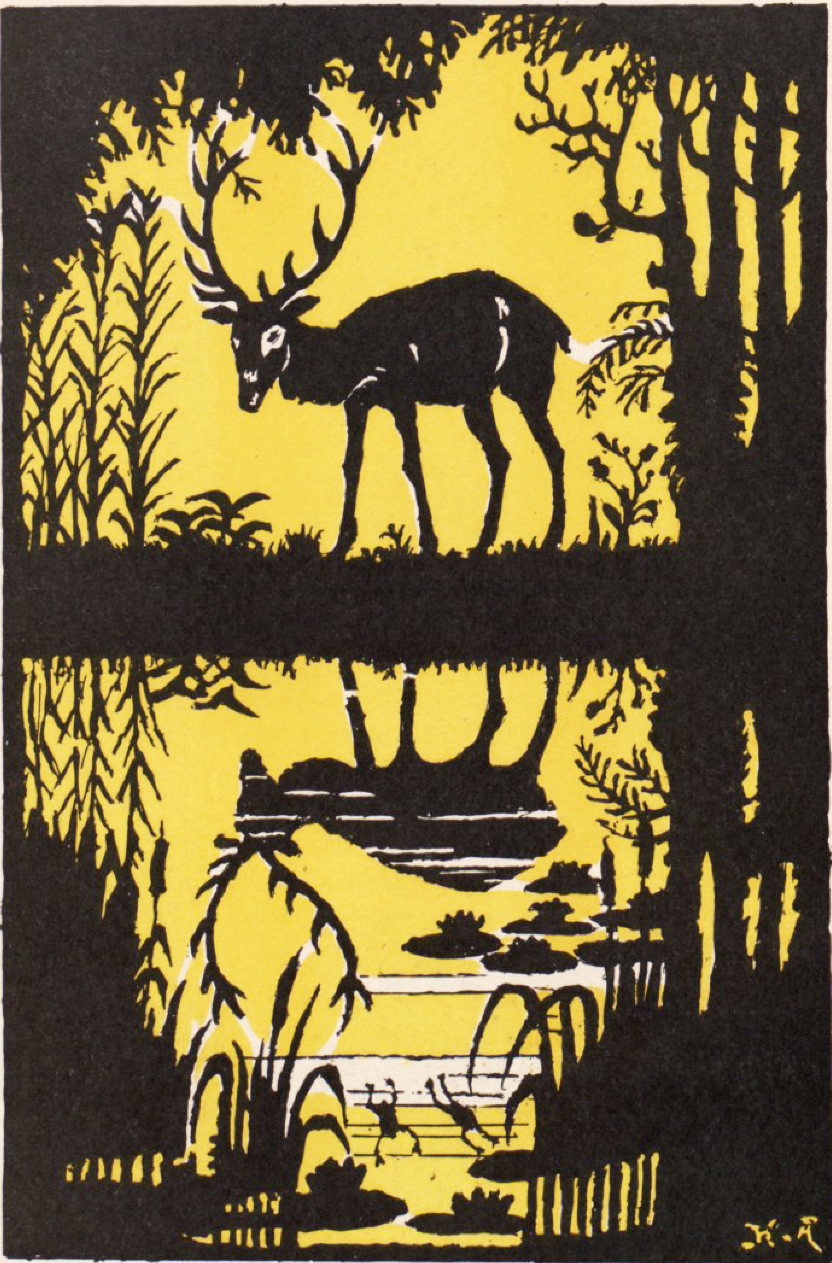 Dessin réalisé par Henri Avelot représentant la fable Le cerf se voyant dans l'eau de Jean de La Fontaine et extraite du livre " Dix fables d'animaux, illustrations en silhouettes humoristiques aux dépens des humains " (Paris, édition Henri Laurens, 1932).